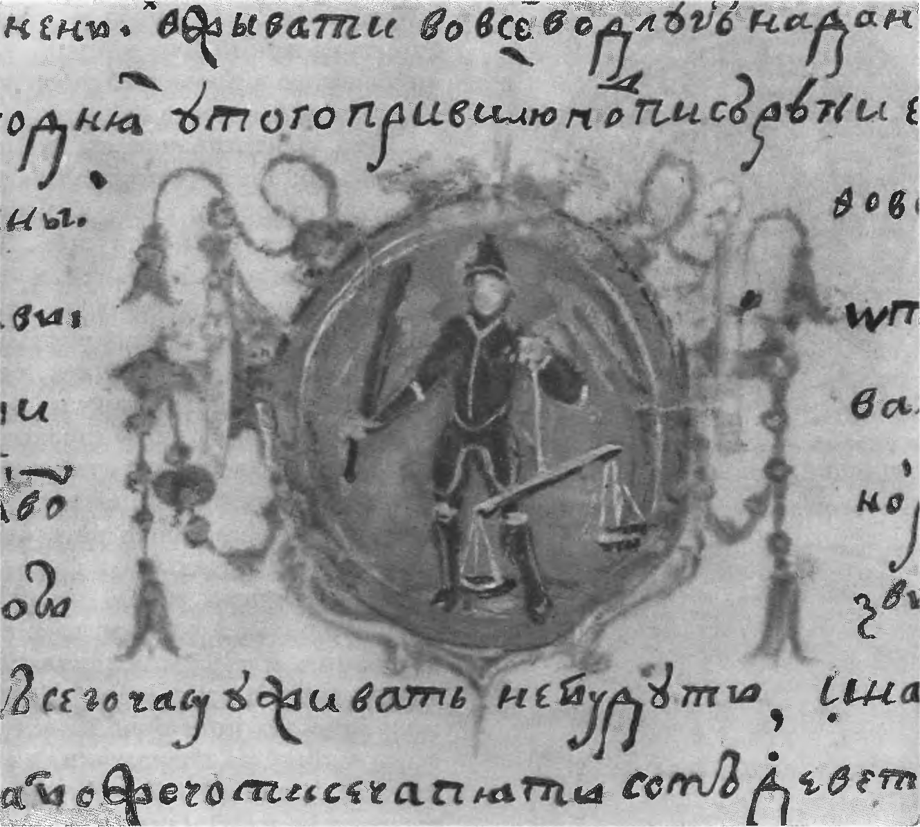 Беларуская (тарашкевіца): Наваградак (Navahradak). Герб места